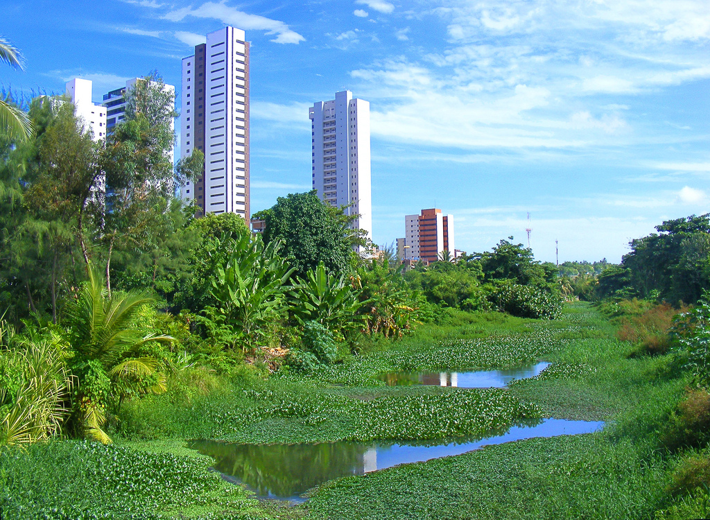 Rio Jaguaribe - João Pessoa - Paraíba - Brasil